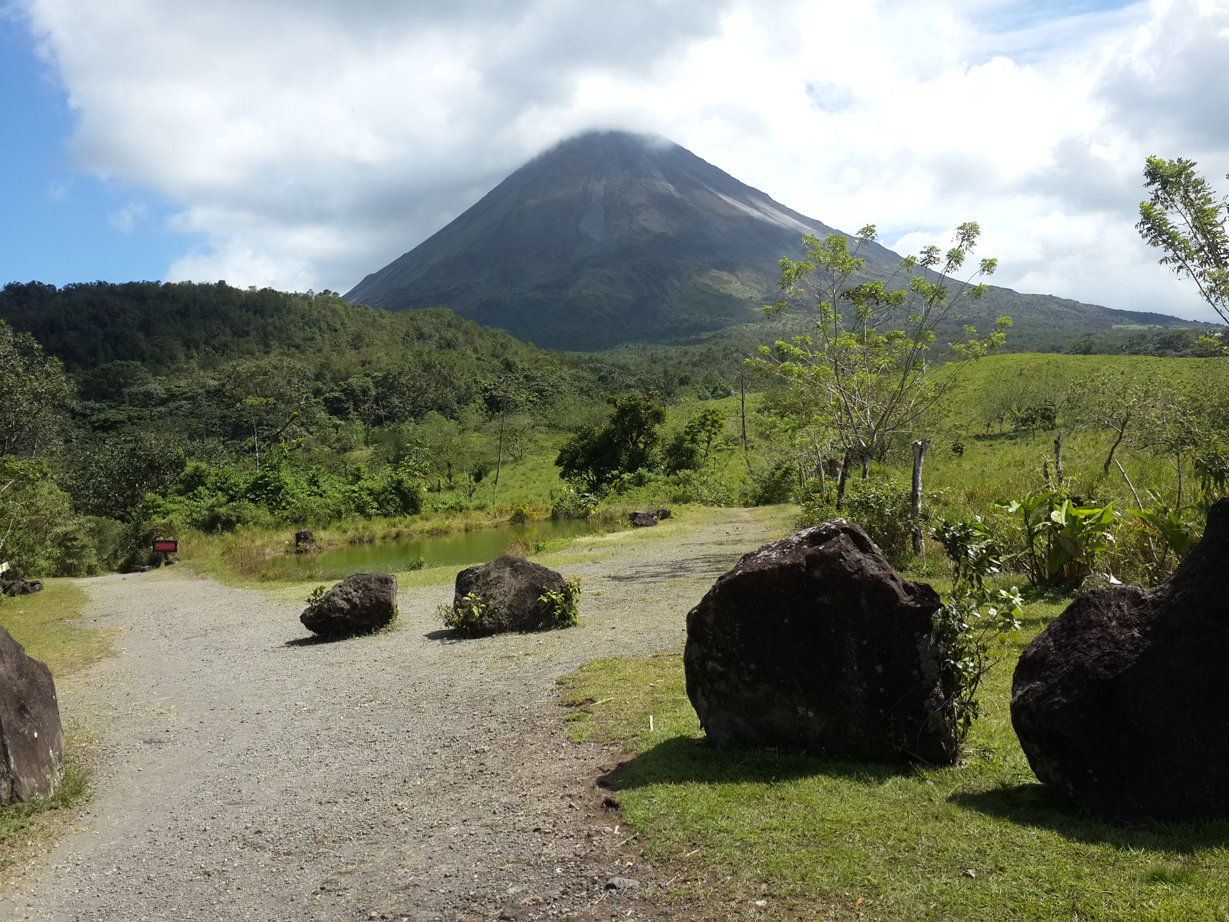 Фотографија на вулканот Аренал во позадина, со четири црни карпи во преден план. Овие карпи некогаш биле дел од лавата на вулканот.